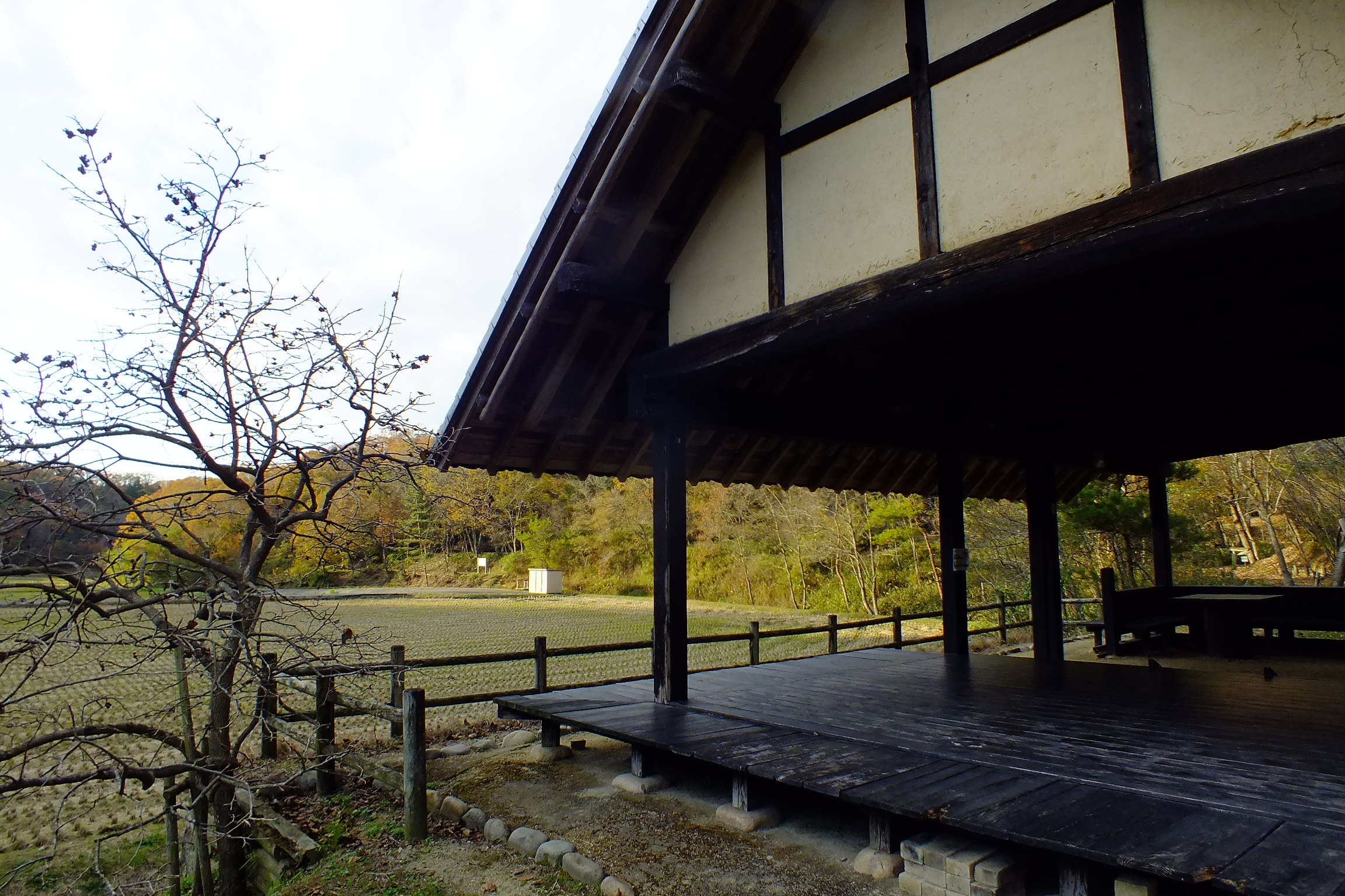 2016-11-25 Yashiro forest park,やしろの森公園 実りの東屋